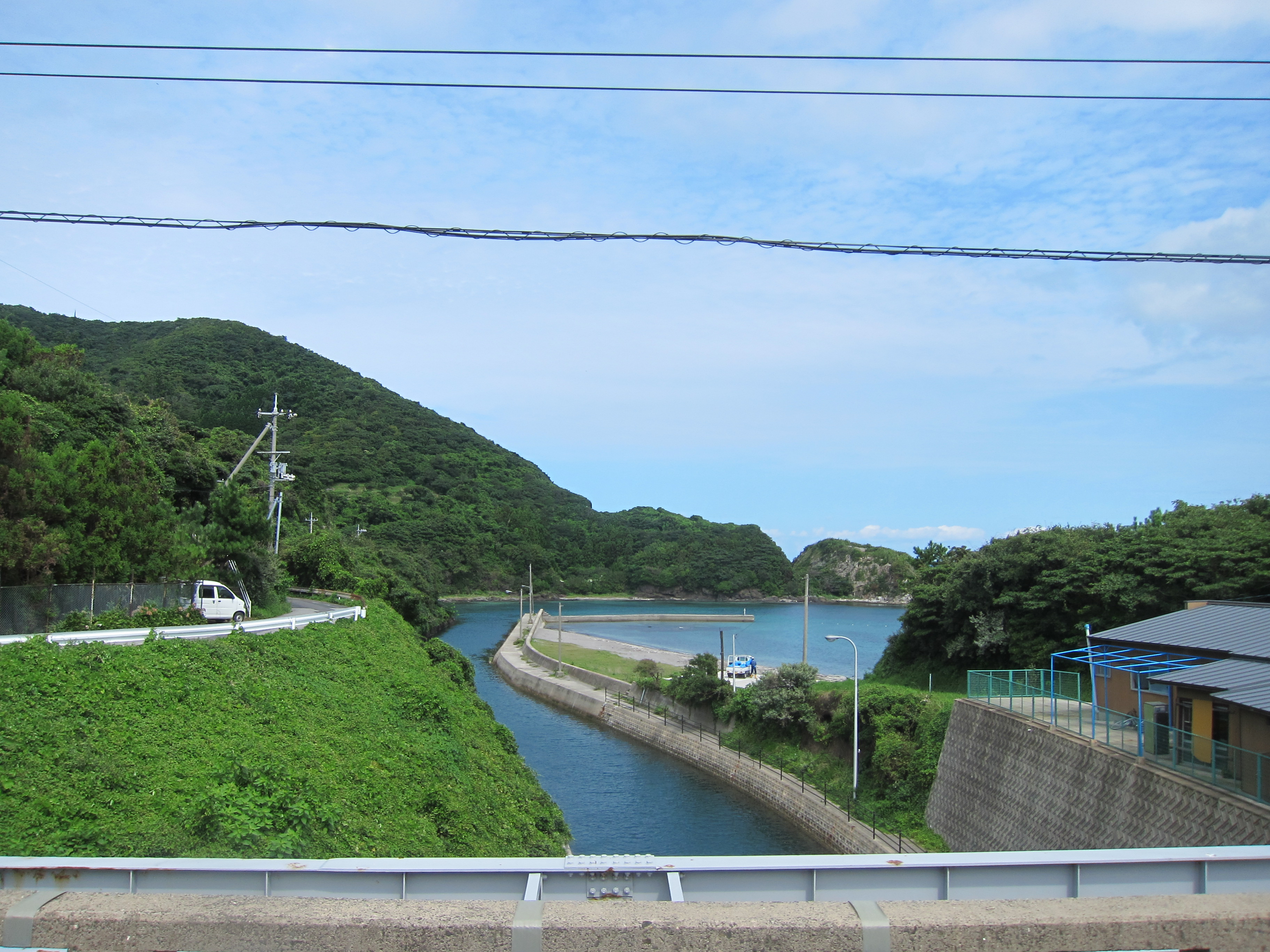 船引運河。島根県隠岐郡西ノ島町美田（隠岐諸島の西ノ島）。